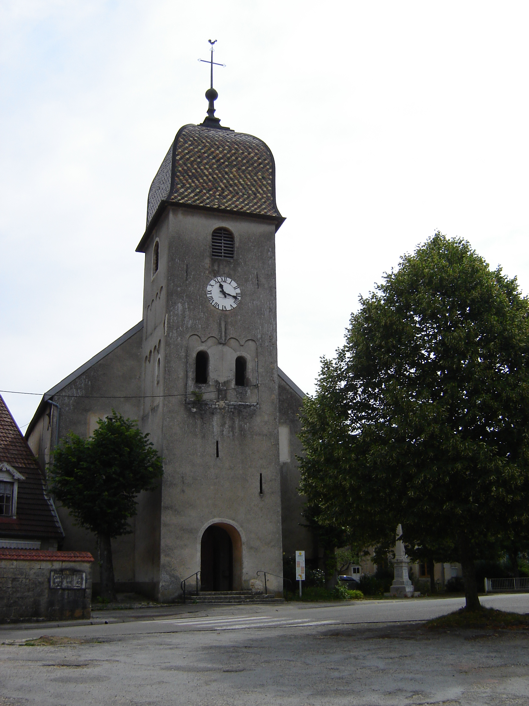 Clocher du douzième de l'église de Byans sur Doubs